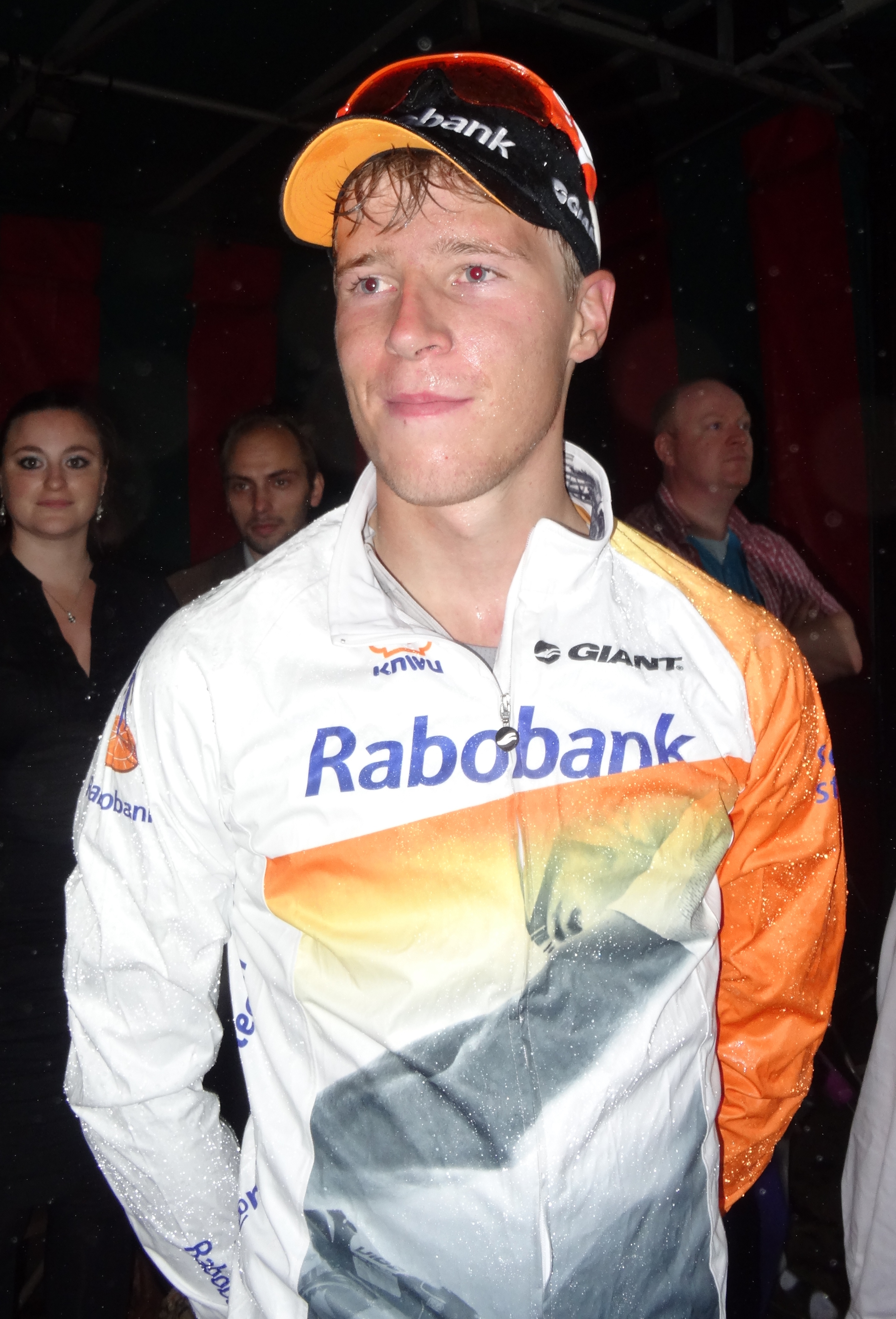 Reportage photographique réalisé le dimanche 10 août à l'occasion du départ et de l'arrivée de la Flèche du port d'Anvers 2014 à Merksem (Anvers), Belgique.